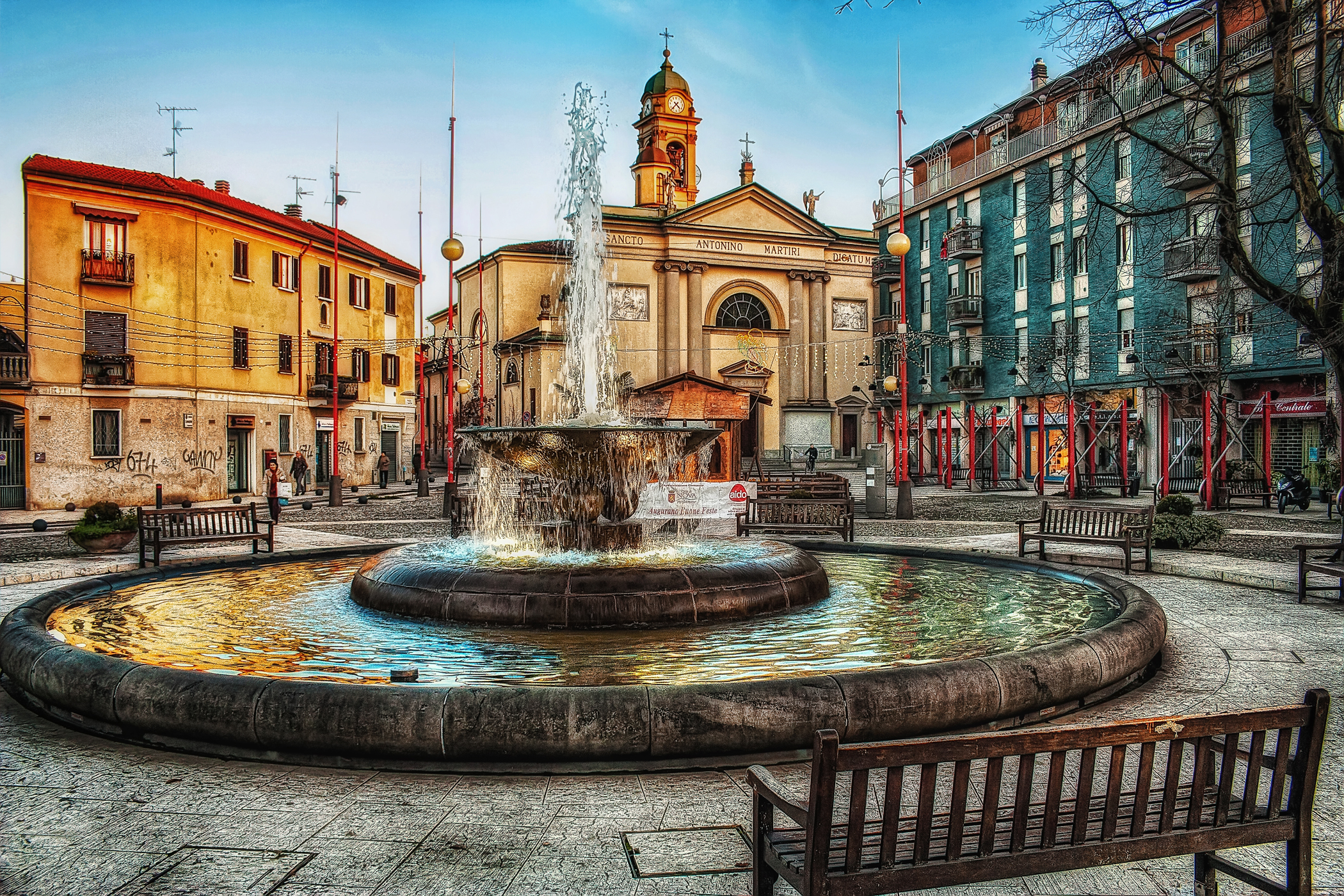 Piazza Marconi, Nova Milanese e chiesa di Sant'Antonino Martire This is a photo of a monument which is part of cultural heritage of Italy.